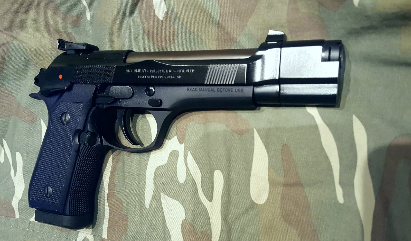 Modello di Beretta 96 Combat Combo in calibro 40 SW